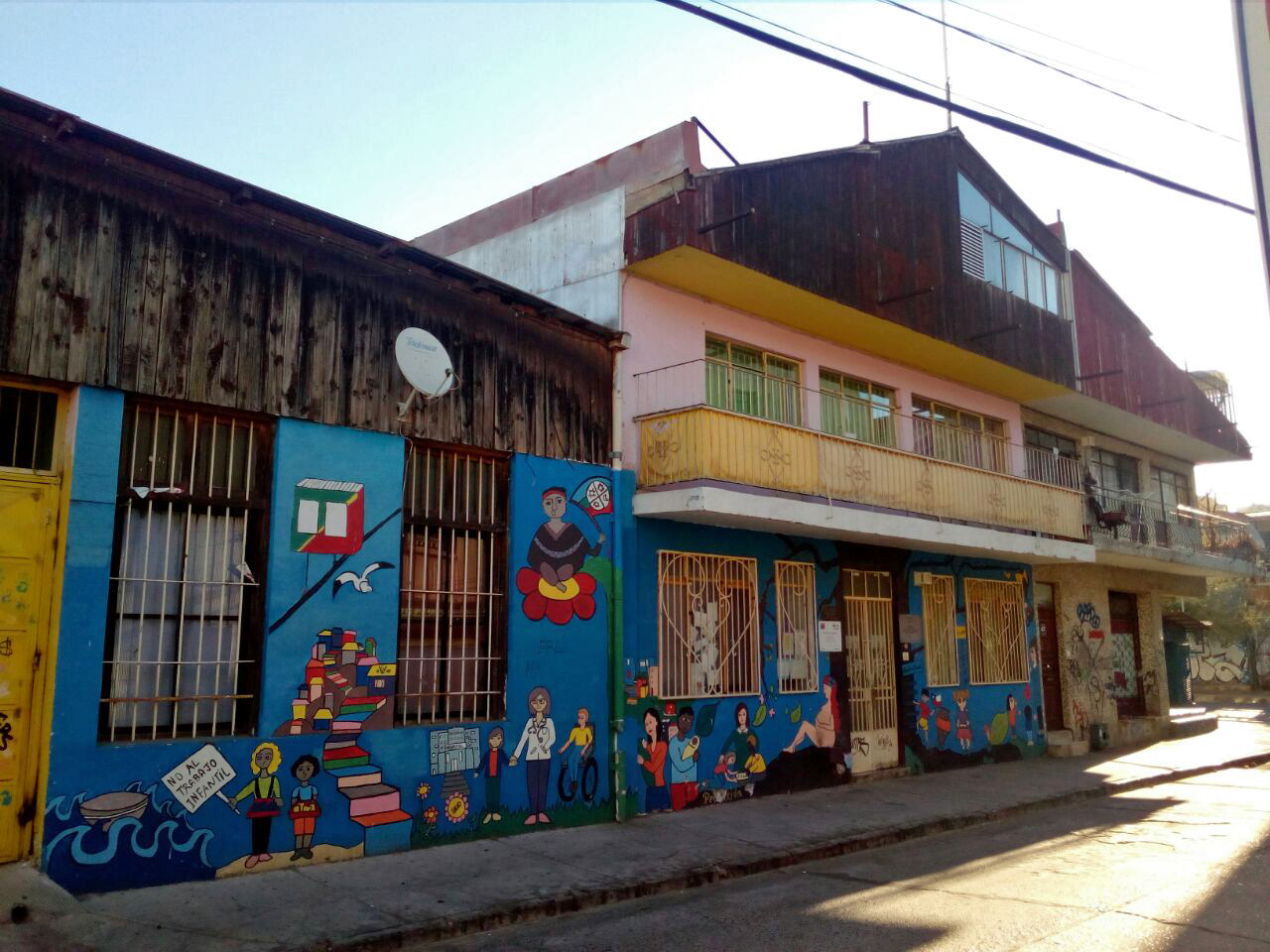 Jardín Infantil Conejito Blanco Universidad de Valparaíso Chiloé 1918, Valparaíso, Chile